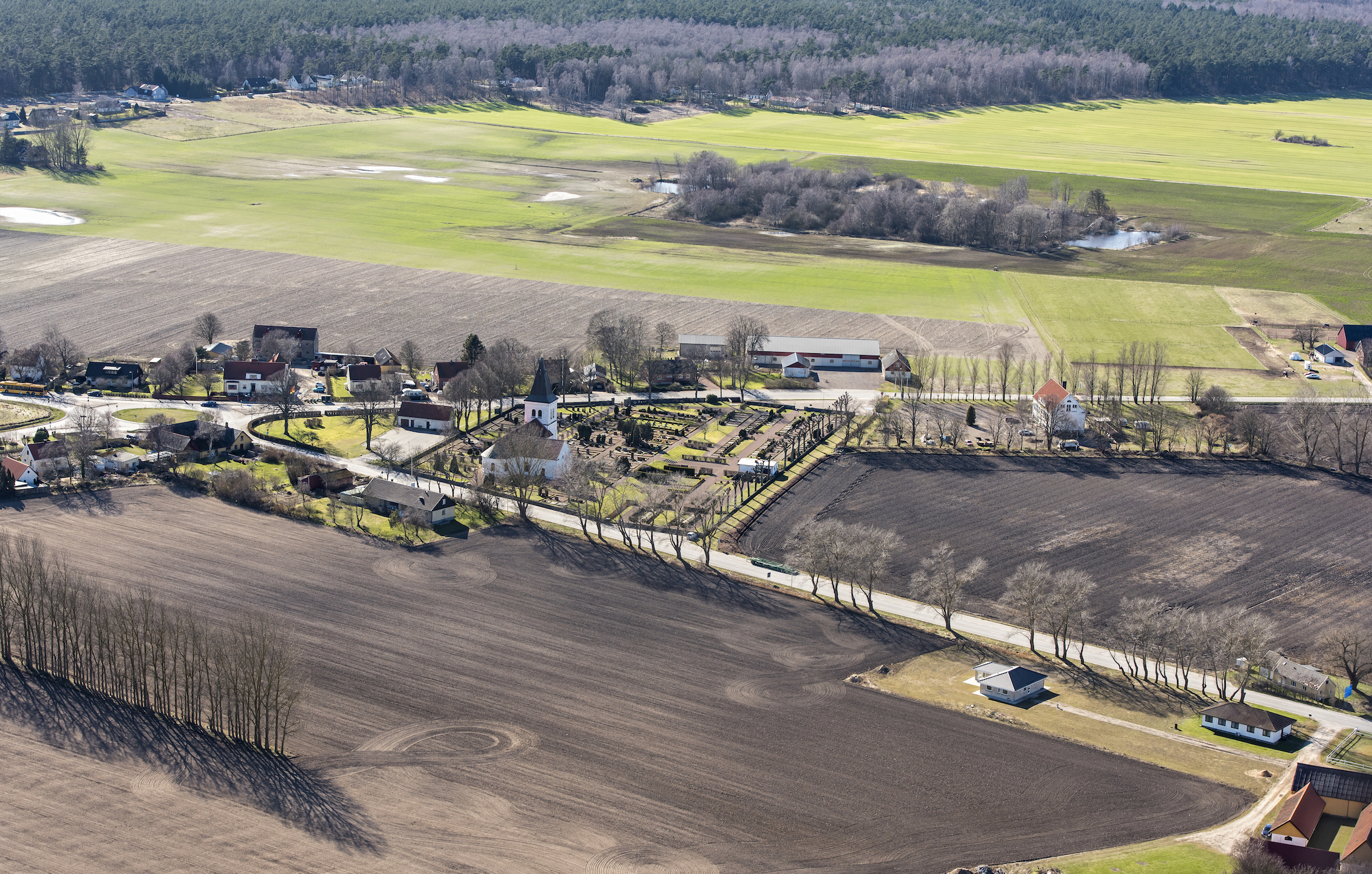 Saxtorps kyrka, kyrkomiljö. Länsväg 110 passerar öster om kyrkan i bildens nedre del.